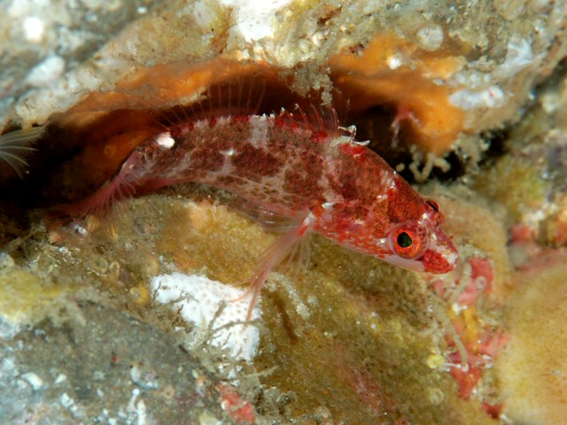 チビハナダイ Plectranthias longimanus